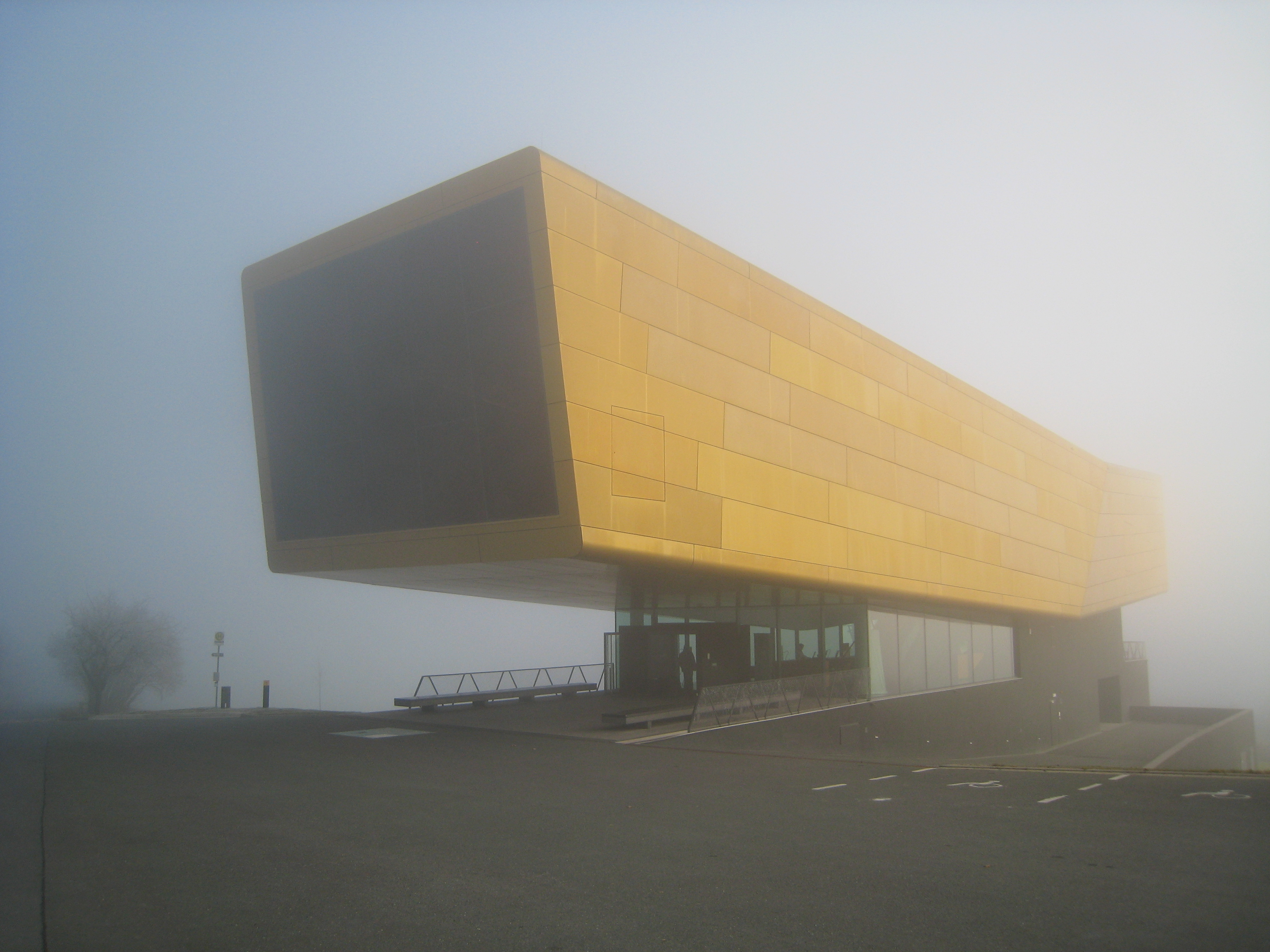 Blick auf den Eingangsbereich des Besucherzentrums